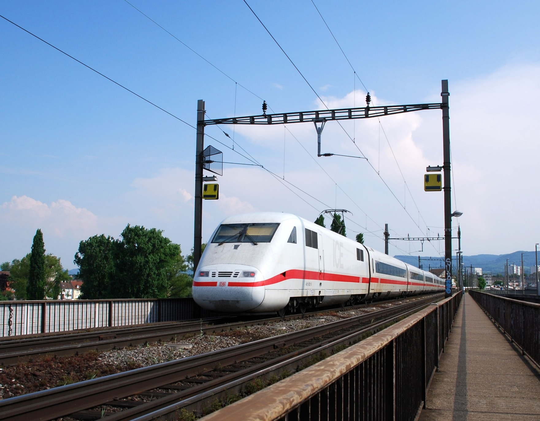 Phasentrennstelle an der Basler Verbindungsbrücke